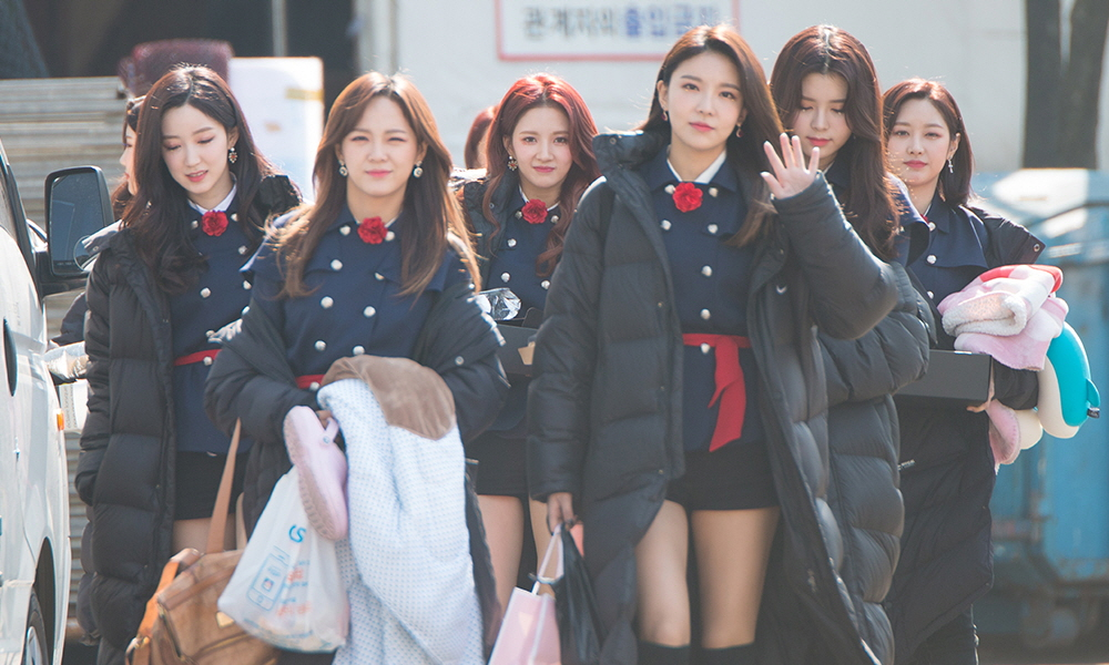 20180311 구구단 인기가요 퇴근길